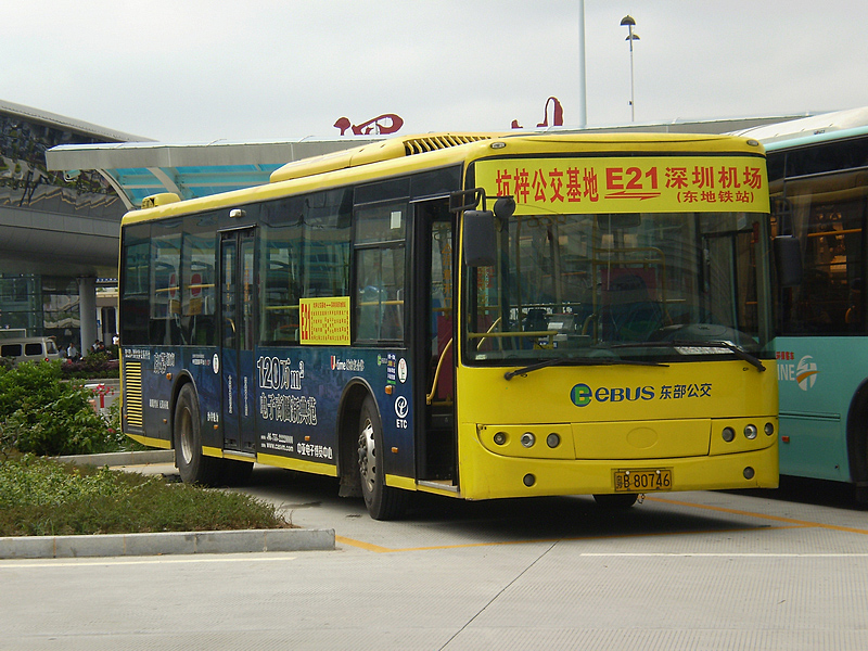 中文（中国大陆）: 深圳公交E21路